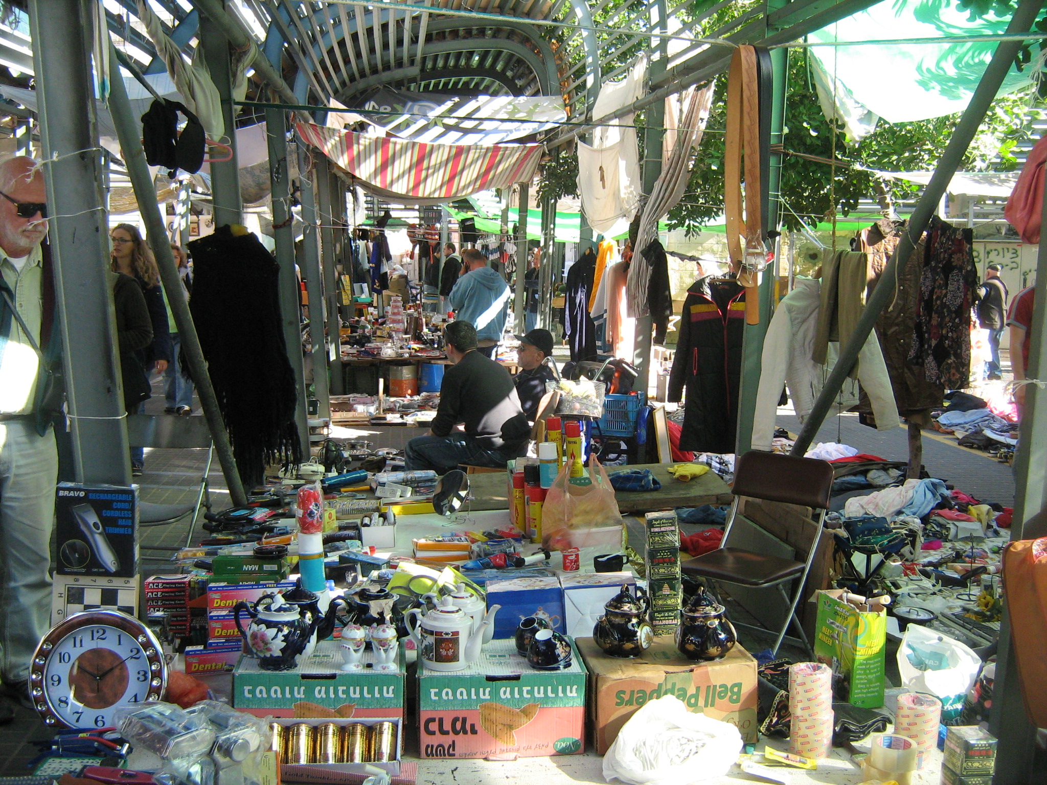 שוק הפשפשים ביפו